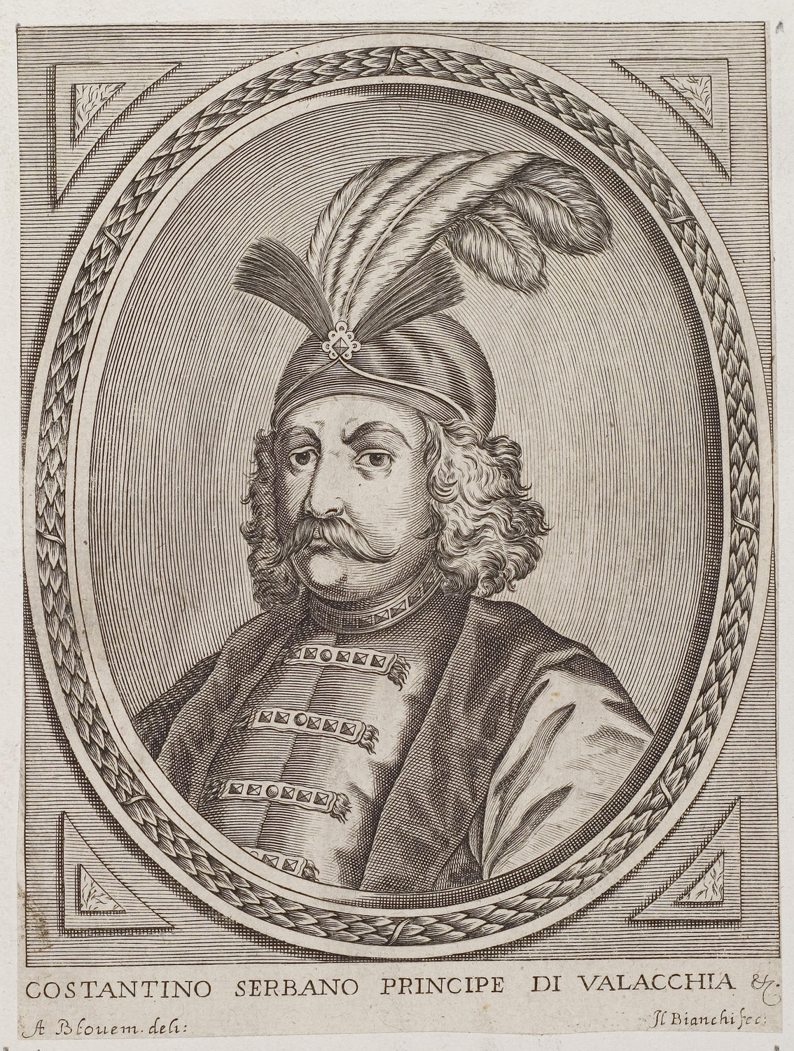 Grafik aus dem Klebeband Nr. 2 der Fürstlich Waldeckschen Hofbibliothek Arolsen Motiv: Constantin Șerban Basarab, Fürst der Walachei von 1654 bis 1658 u. von Moldau 1659 u. 1661